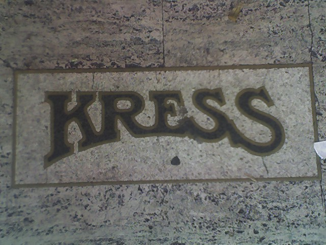 Old lettering for "Kress" department store in sidewalk